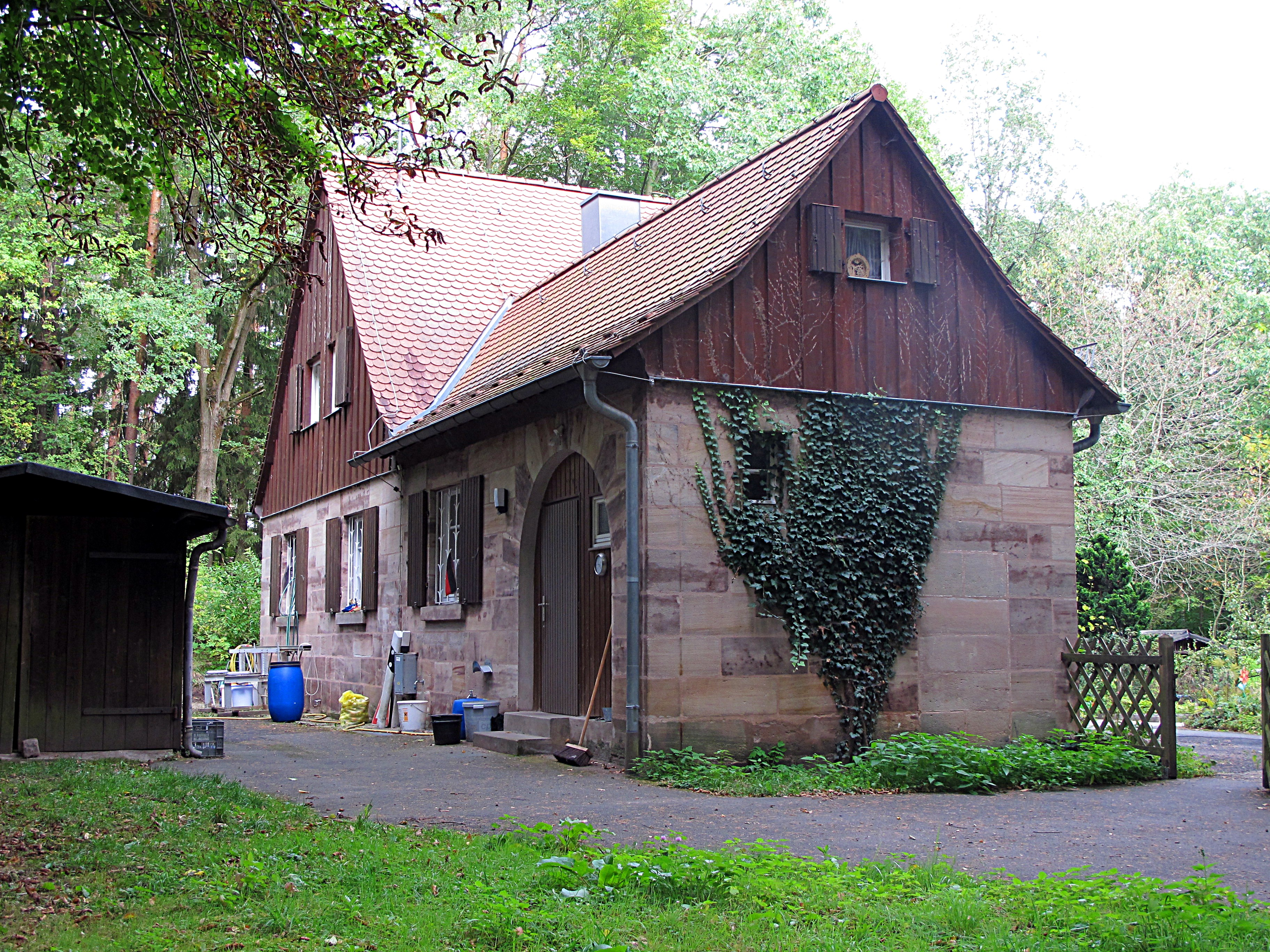 Stadtförsterei Fürth/Oberfürberg, Heilstättenstraße 130